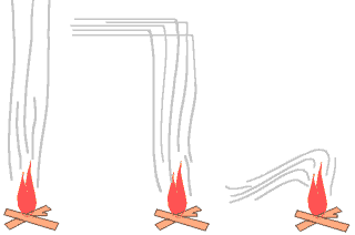 Dessin sommaire